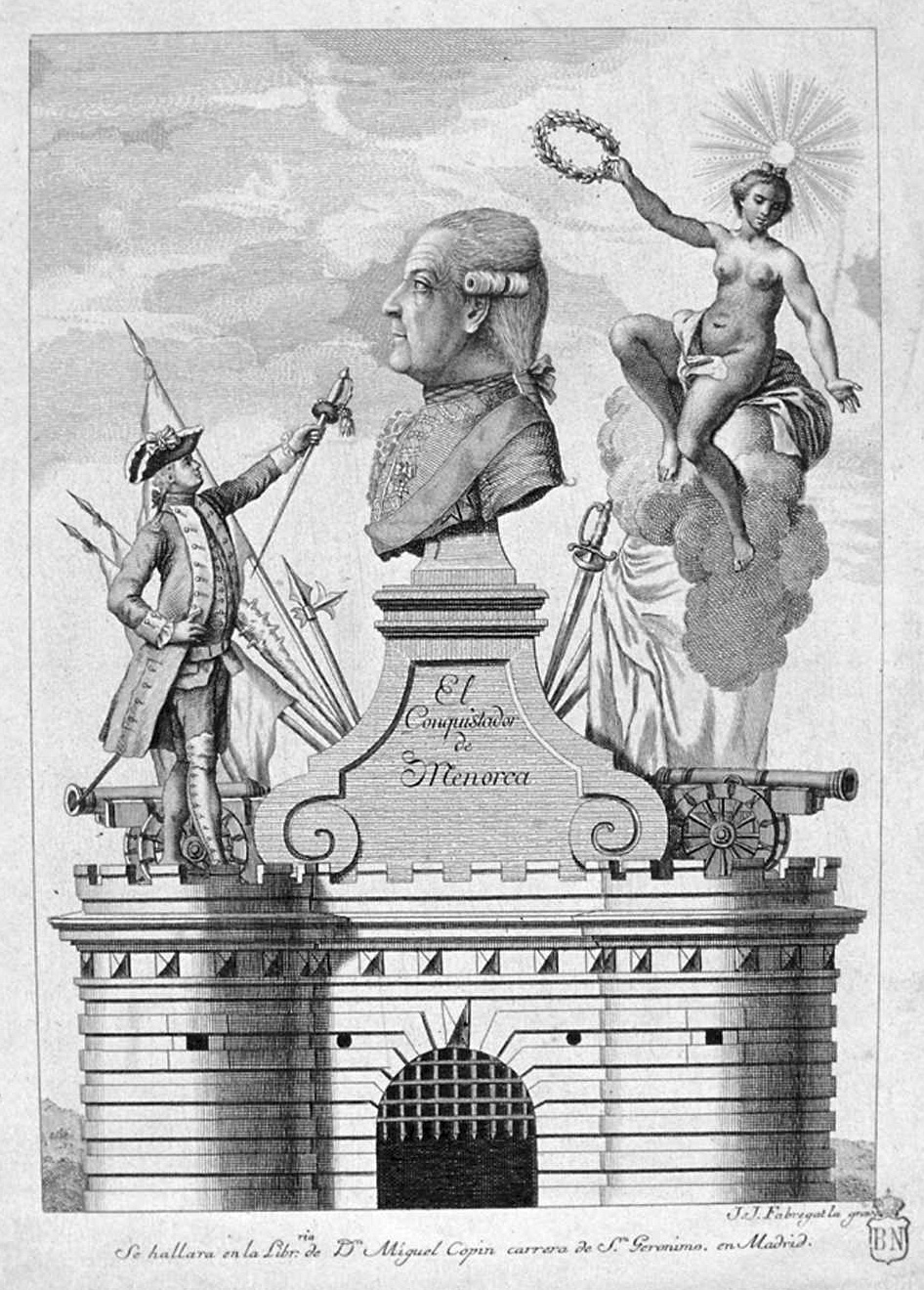 Louis des Balbes de Berton de Crillon, El Conquistador de Minorca